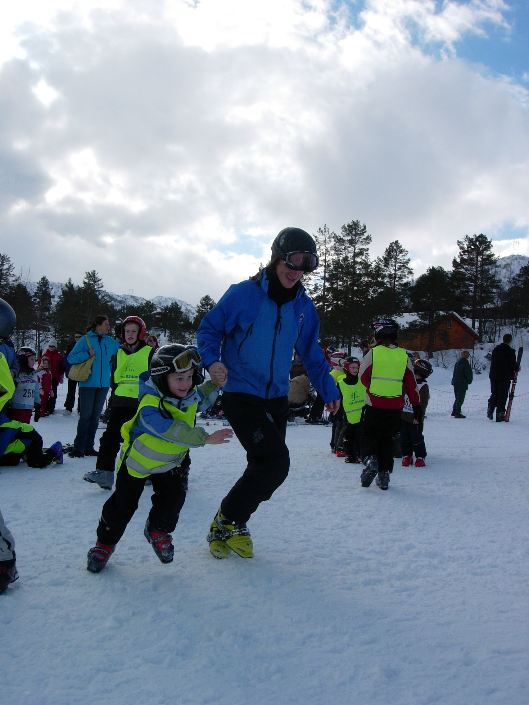 Christoffer Tveit har oppvarming med skiskoleelevene før skiene tas på.